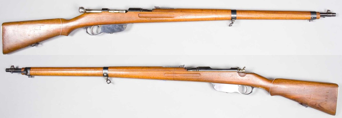 Puška Mannlicher Model 1895, iz Švedskega vojaškega muzeja